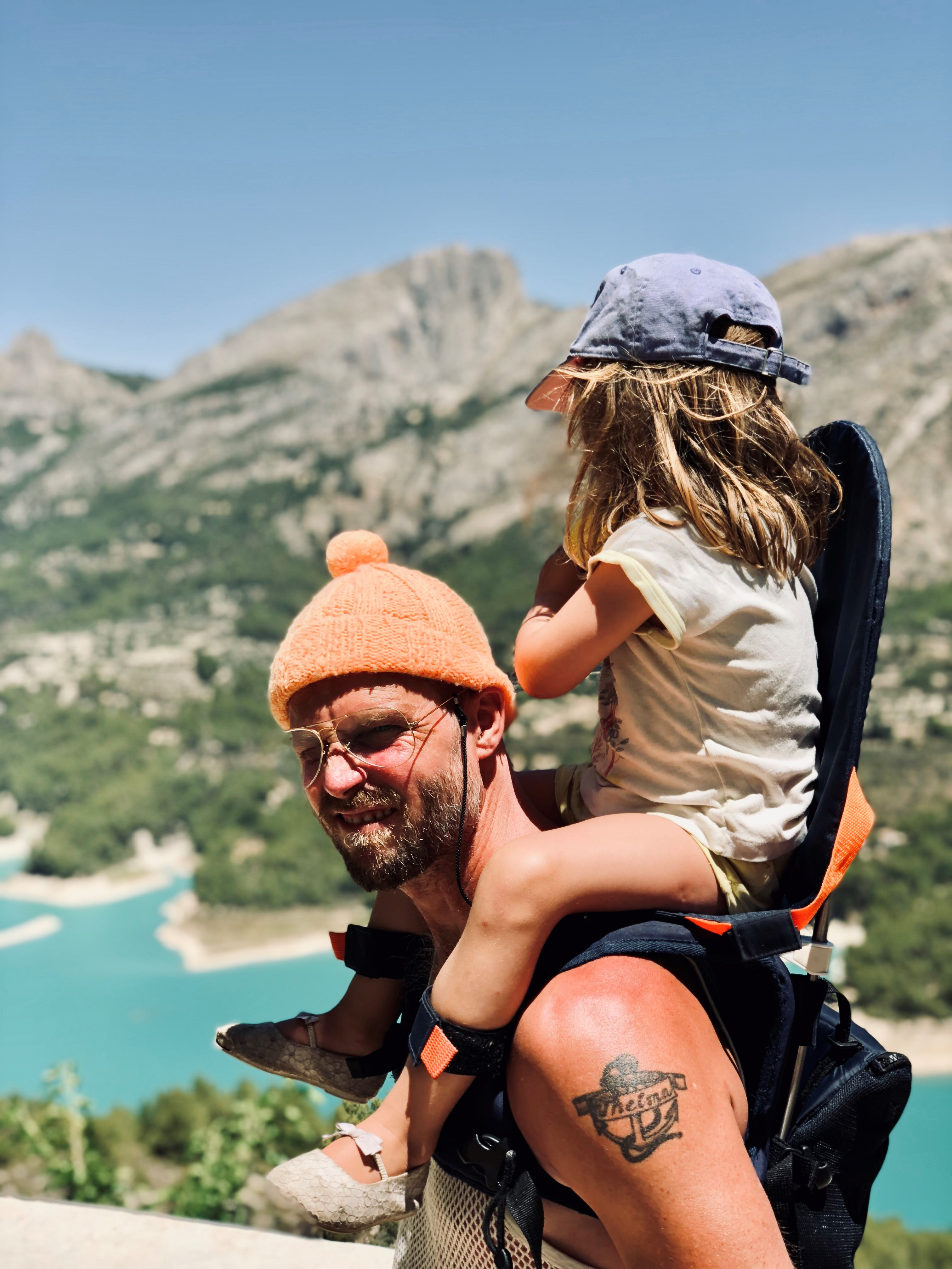 Julius Winger